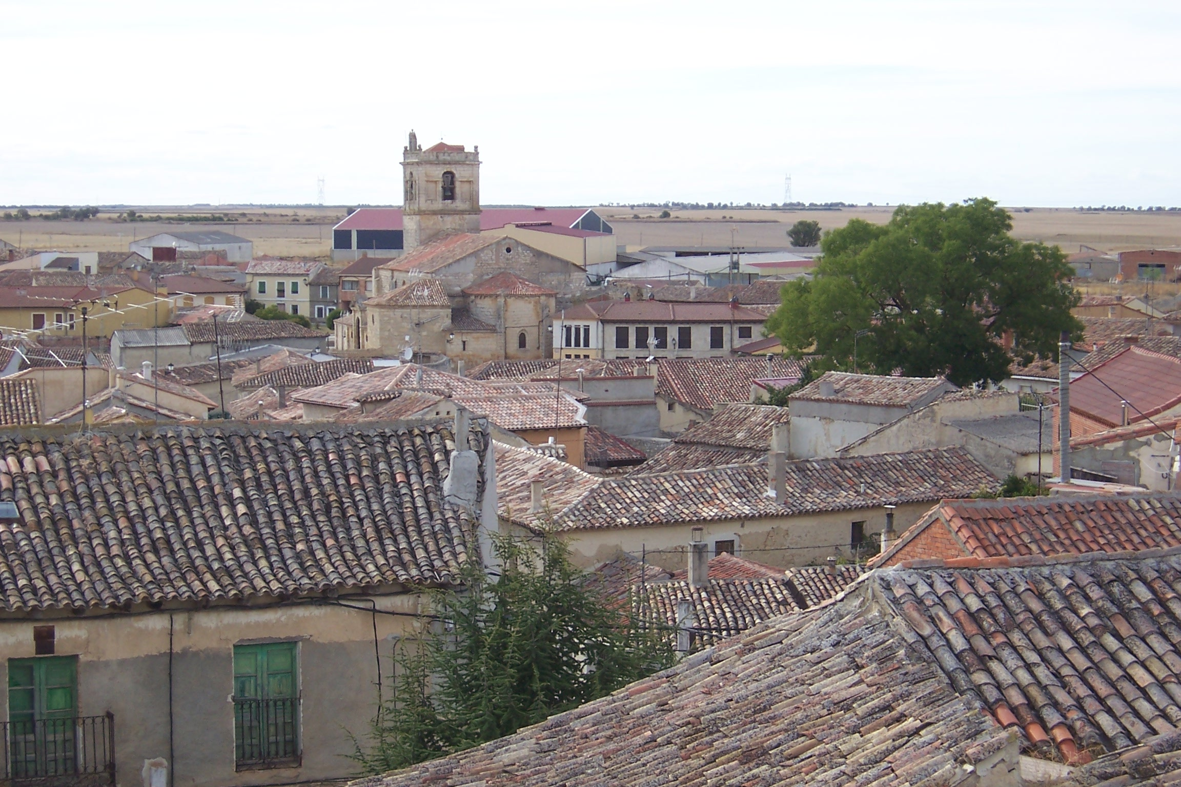 Villalba de los Alcores en la provincia de Valladolid, España. Arquitectura popular con la iglesia de Santiago al fondo.